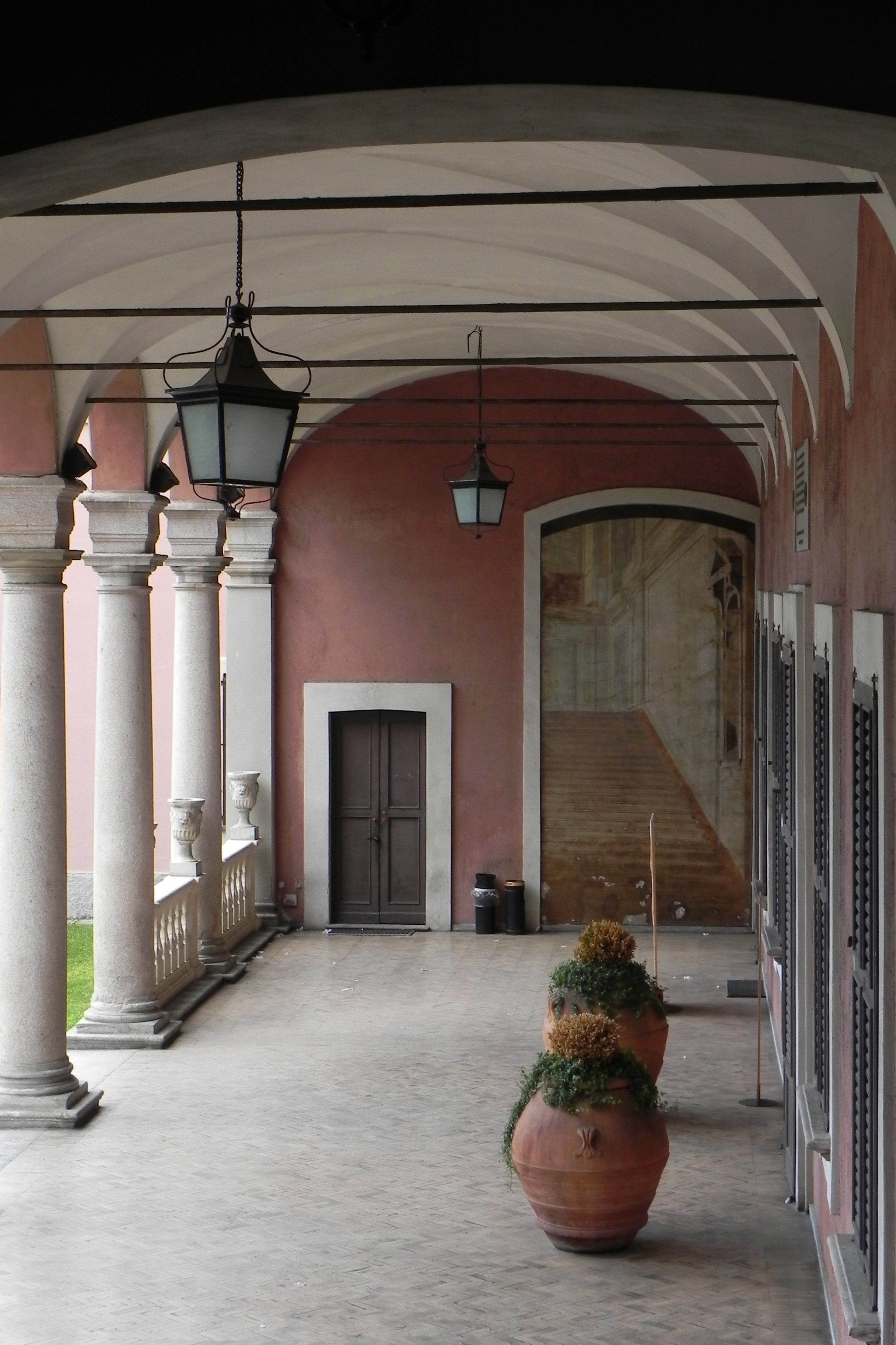 Cinisello Balsamo, Villa Ghirlanda Silva, portico VL01